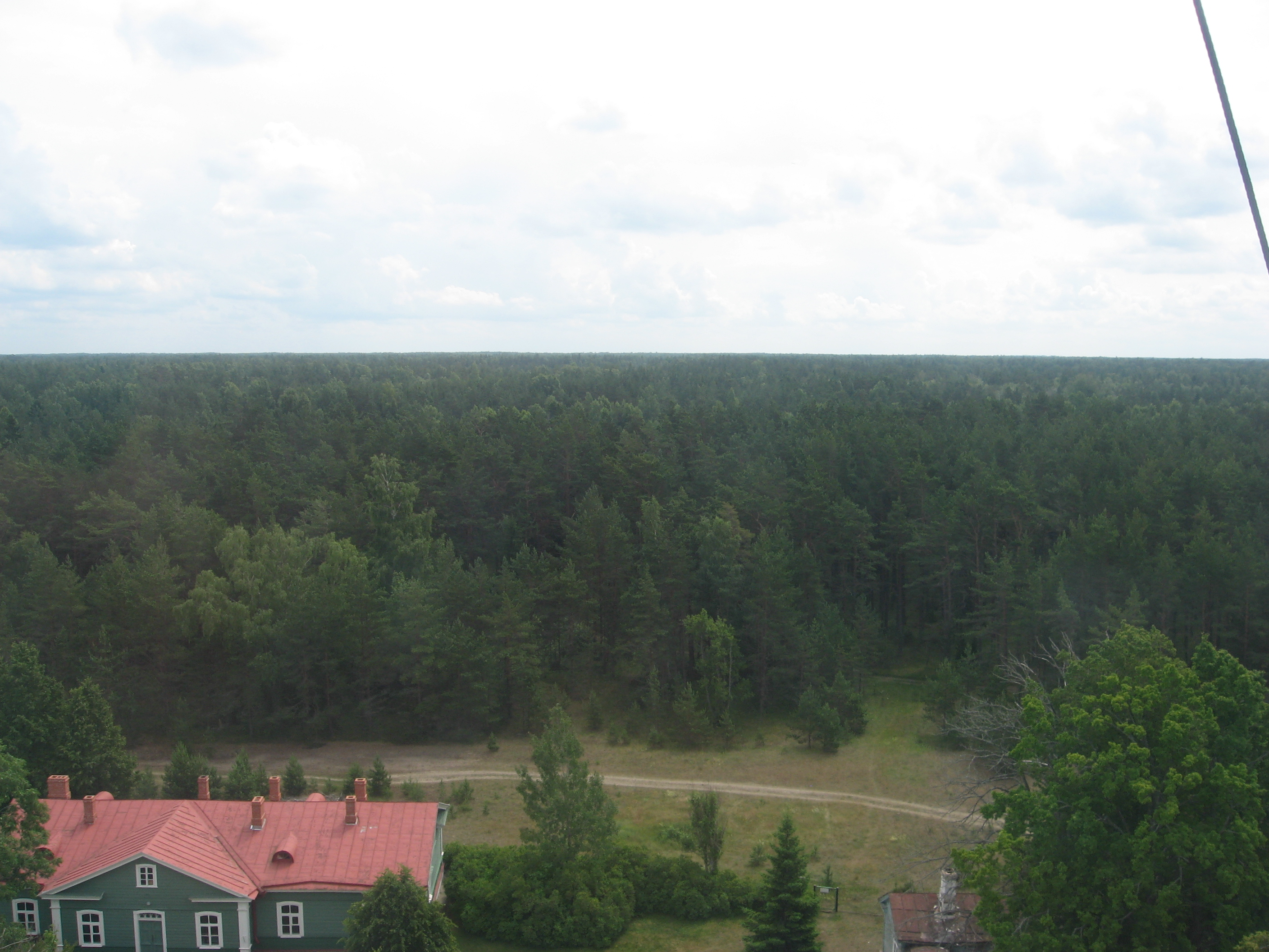 Вид с маяка 1